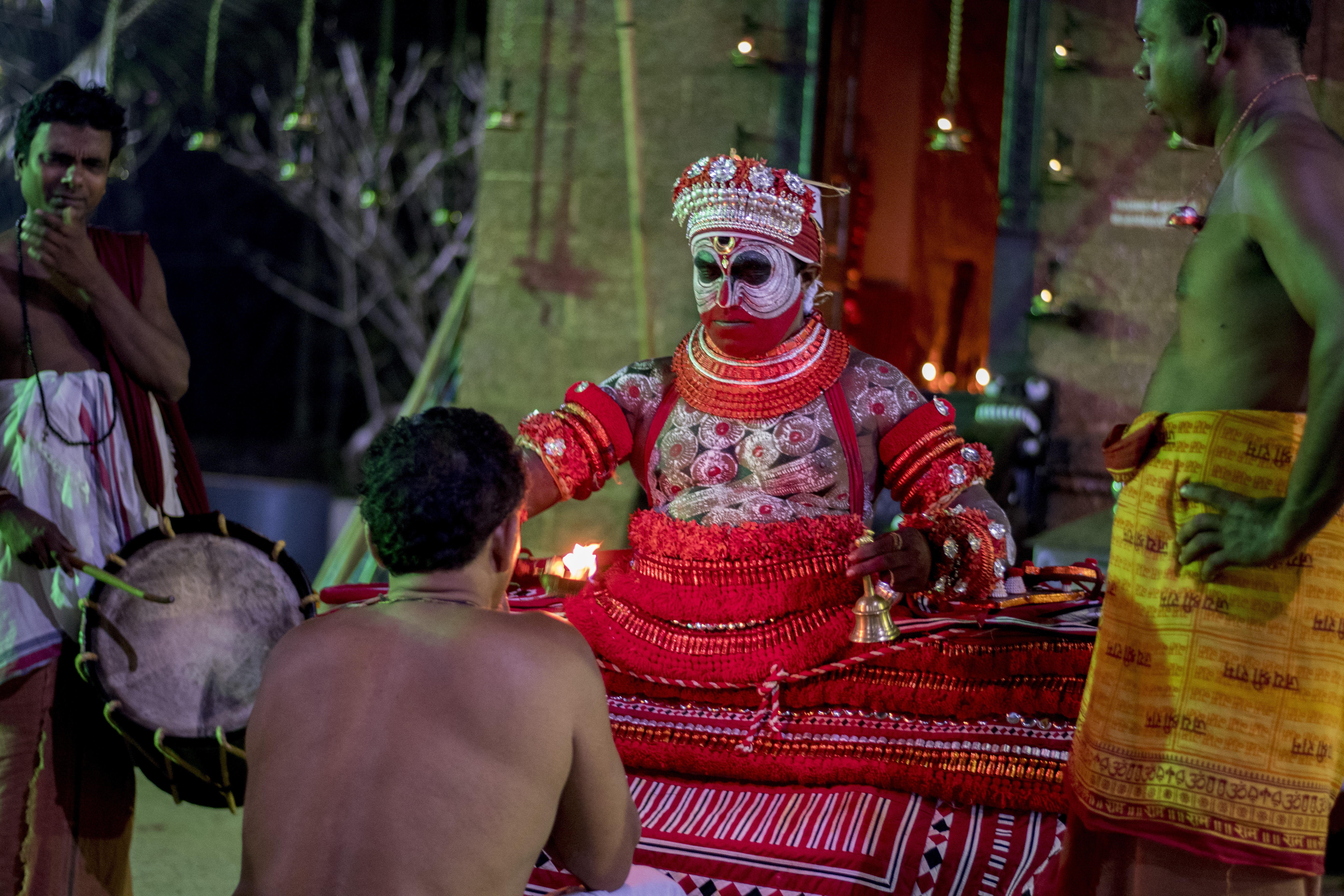 Theyyam at Kakkanam kottam, Edakkad, Kannur